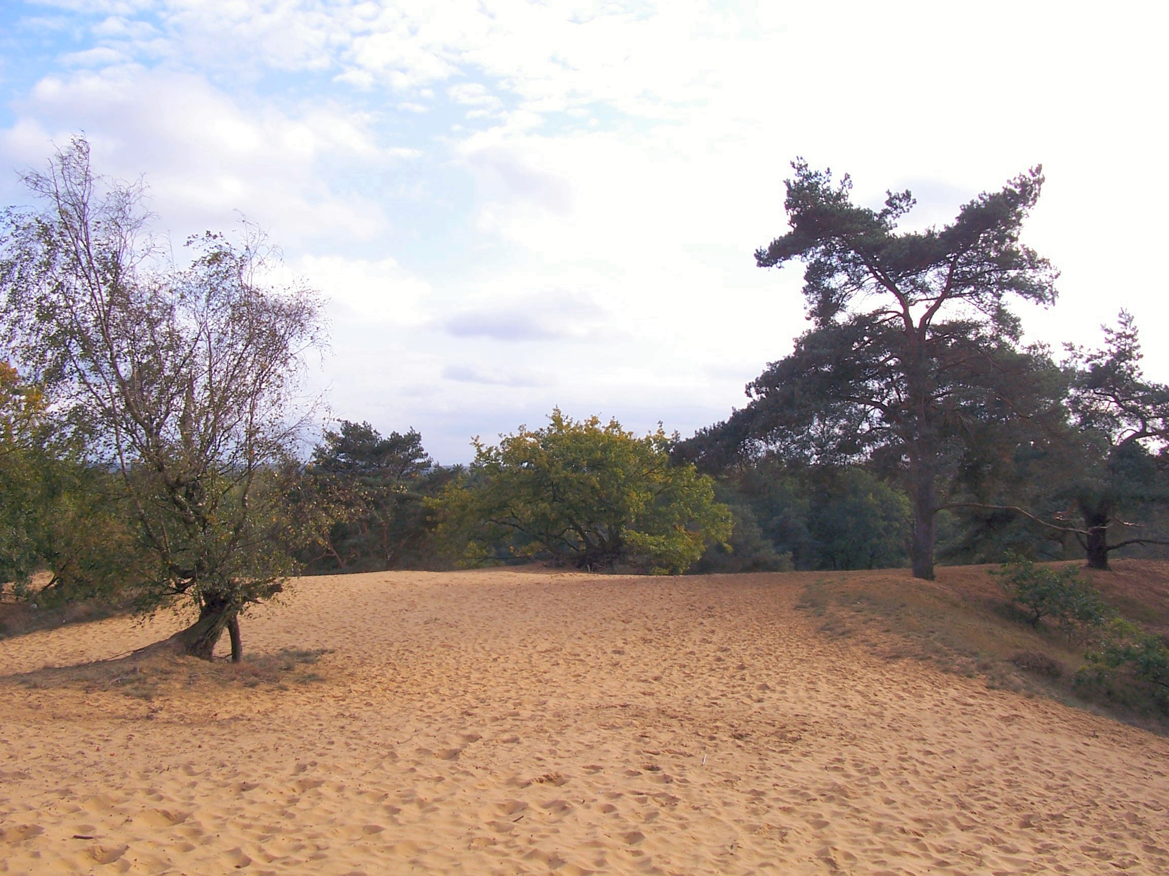 De omgeving van de Oudsberg, een landduin in het Gruitroderbos|Gruitroderbos.